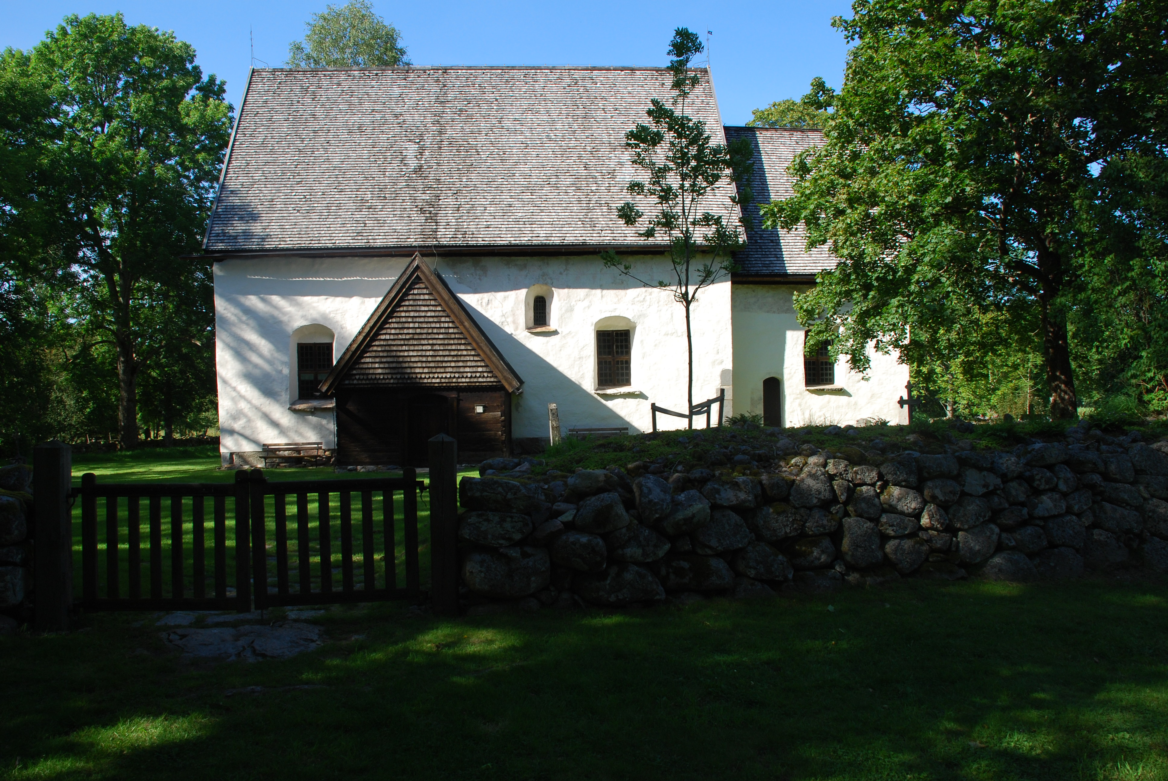 Vederslöv gamla kyrka, south view